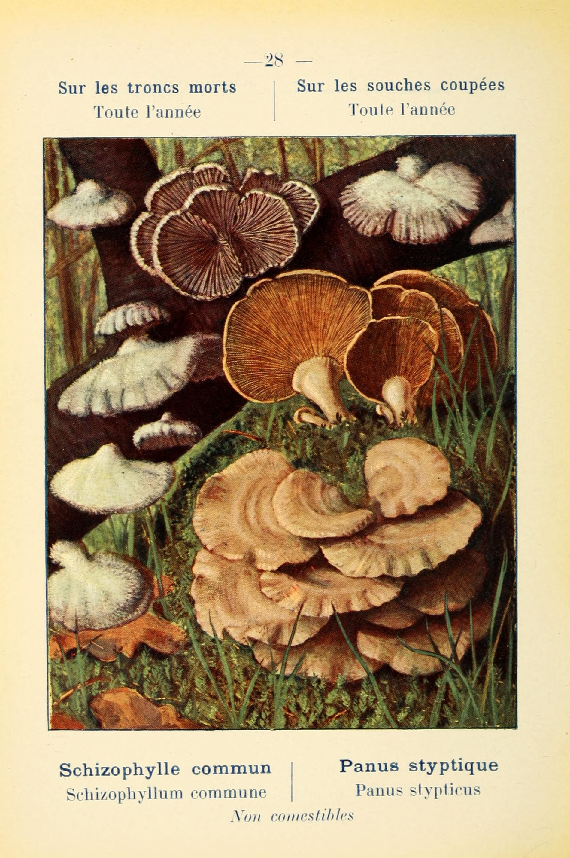 28 - Sur les troncs morts - Toute l'année - Schizophylle commun - Schizophyllum commune Sur les souches coupées - Toute l'année - Panus styptique - Panus stypticus Non comestibles